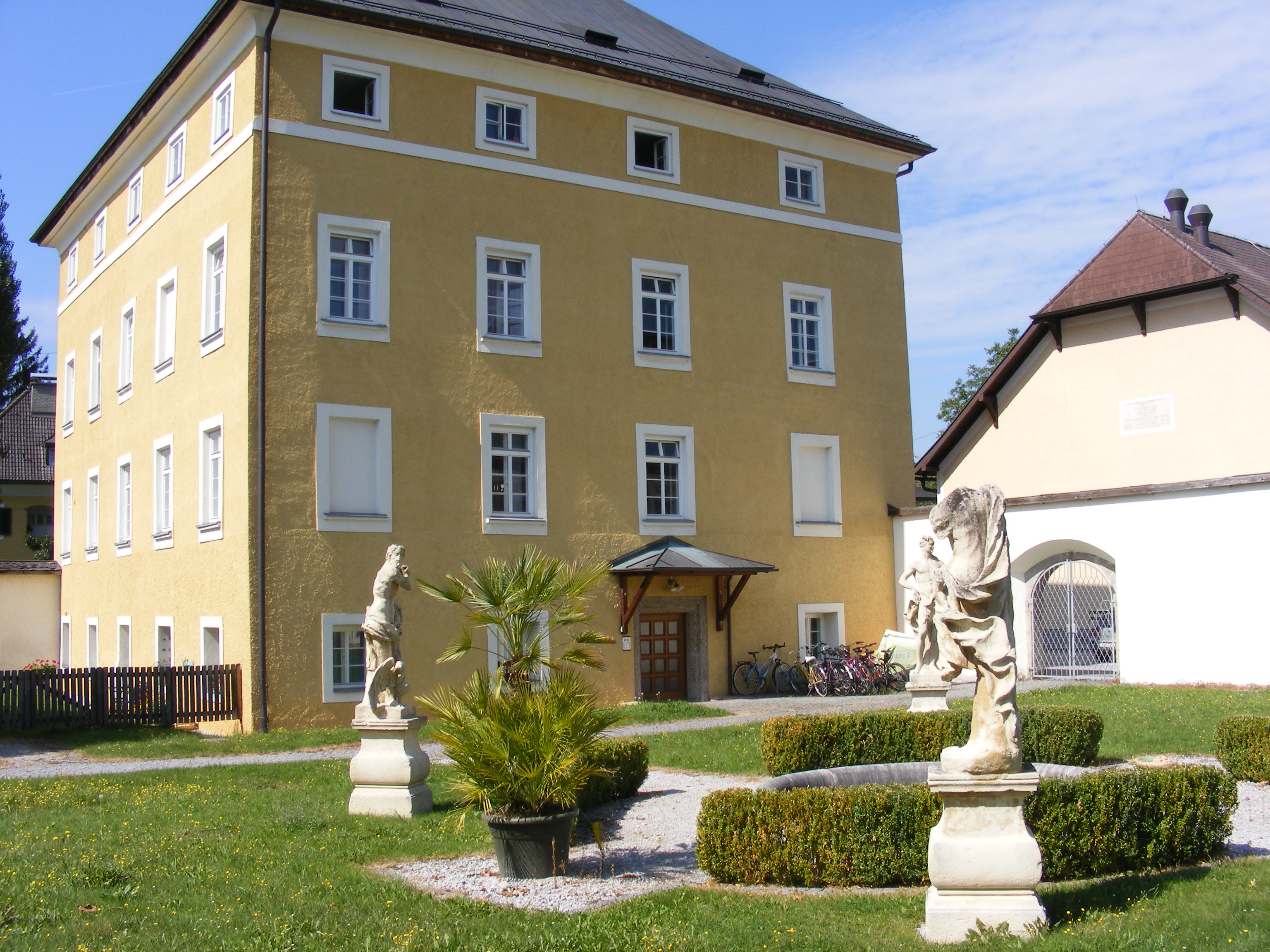 Aiglhof mit Gartenbaudenkmälern